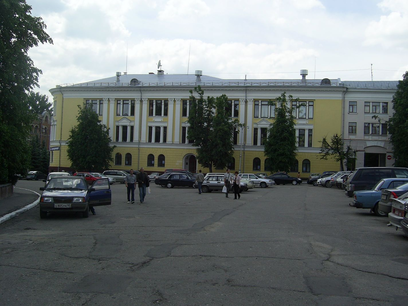 Брянск, площадь Карла Маркса (Красная пл.). Областная библиотека